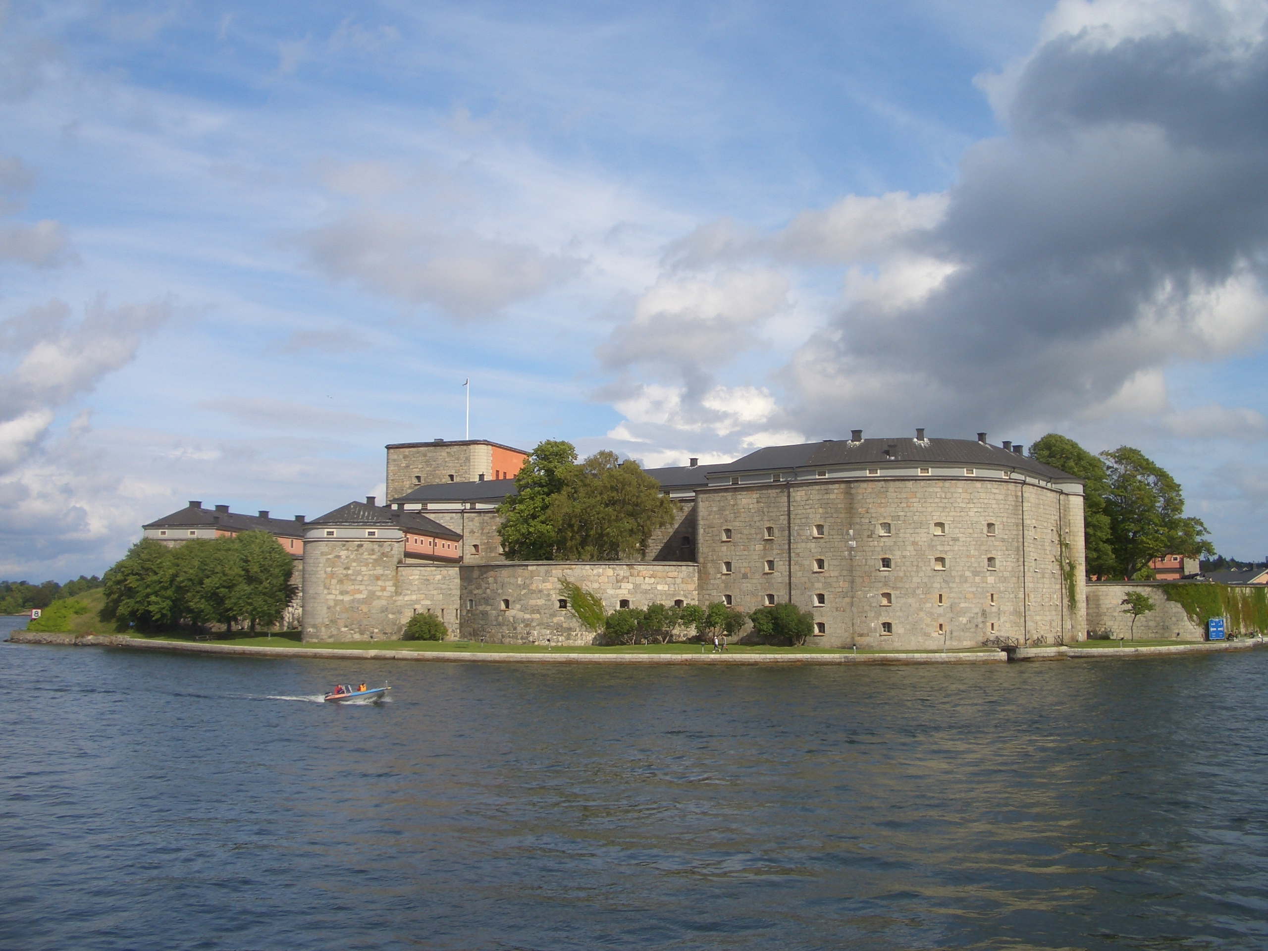 Citadel at Vaxholm